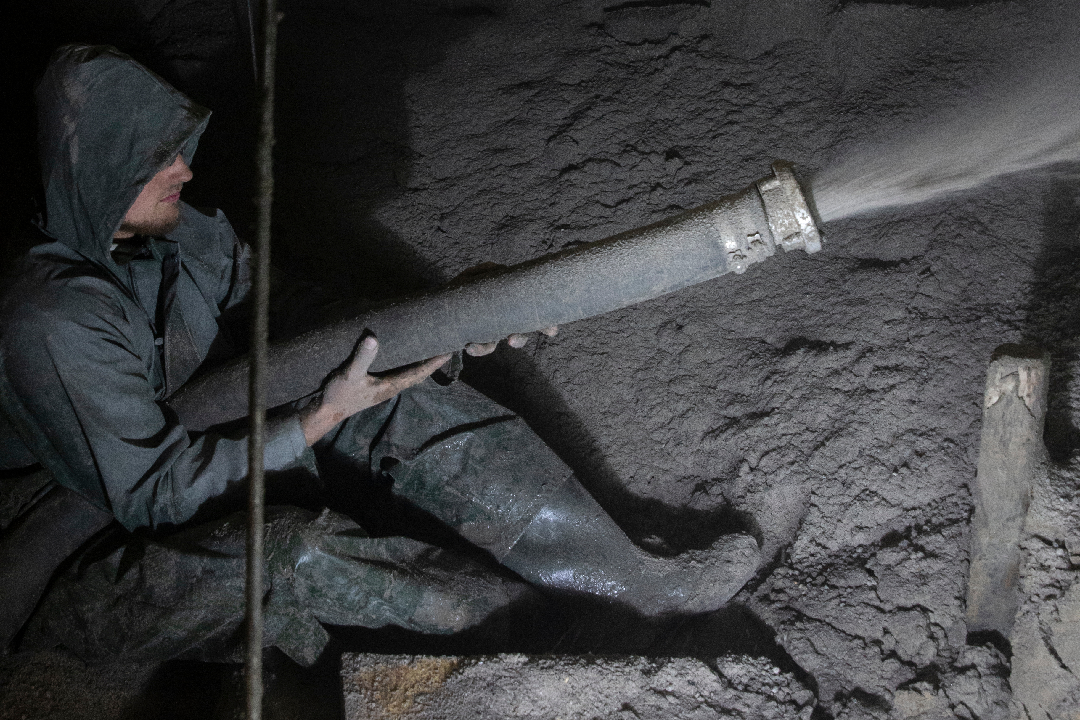 Zandblazen op moeilijk bereikbare plekken, zoals kruipruimtes.